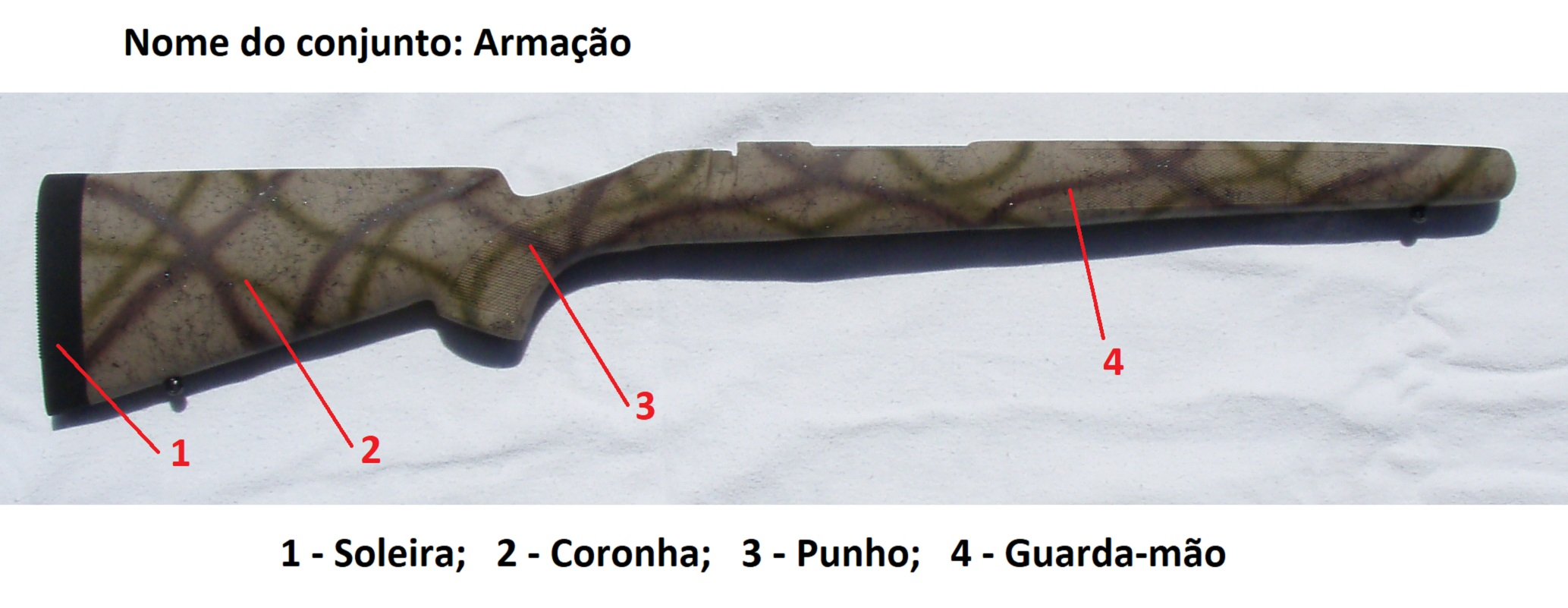 Partes da armação de uma arma de fogo longa (rigle, espingarda, fuzil, etc.): Sendo 1 - Soleira; 2 - Coronha; 3 - Punho e 4 - Guarda-mão.